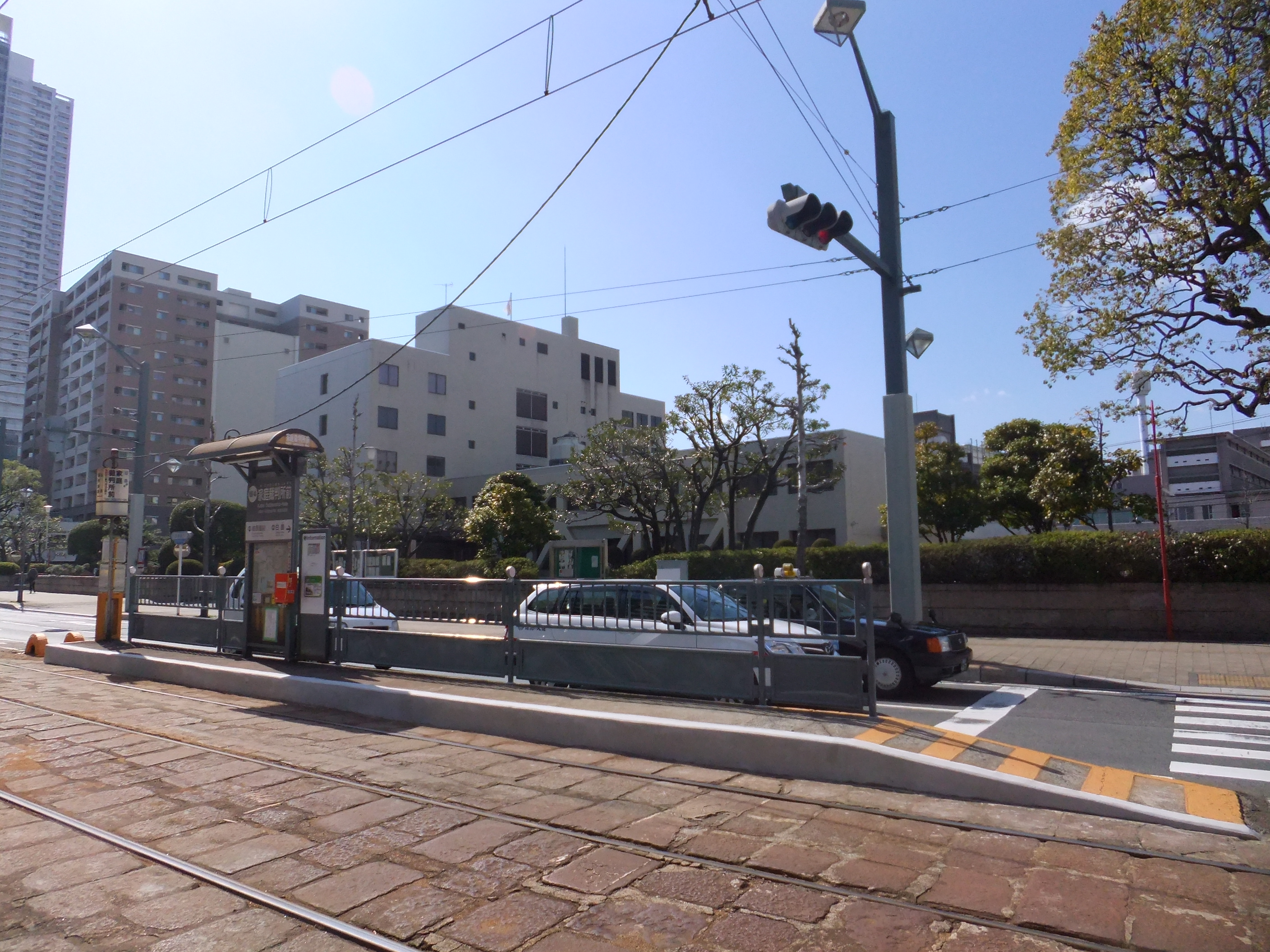 広島電鉄家庭裁判所前電停（白島側）